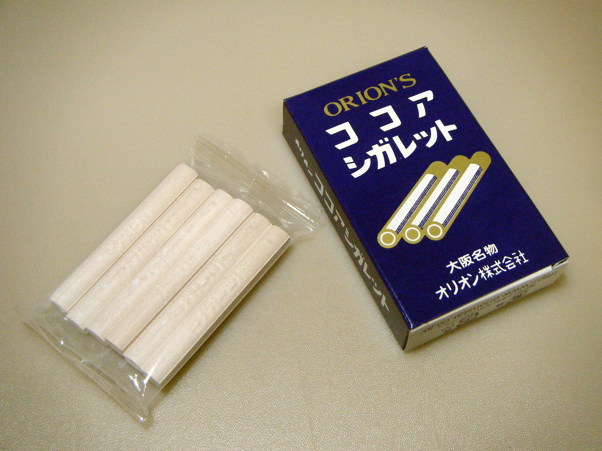 オリオン ココアシガレット 包装と中身